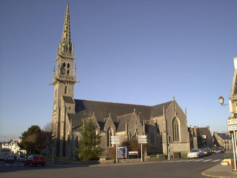 Eglise Saint-Milliau de Plonévez-Porzay